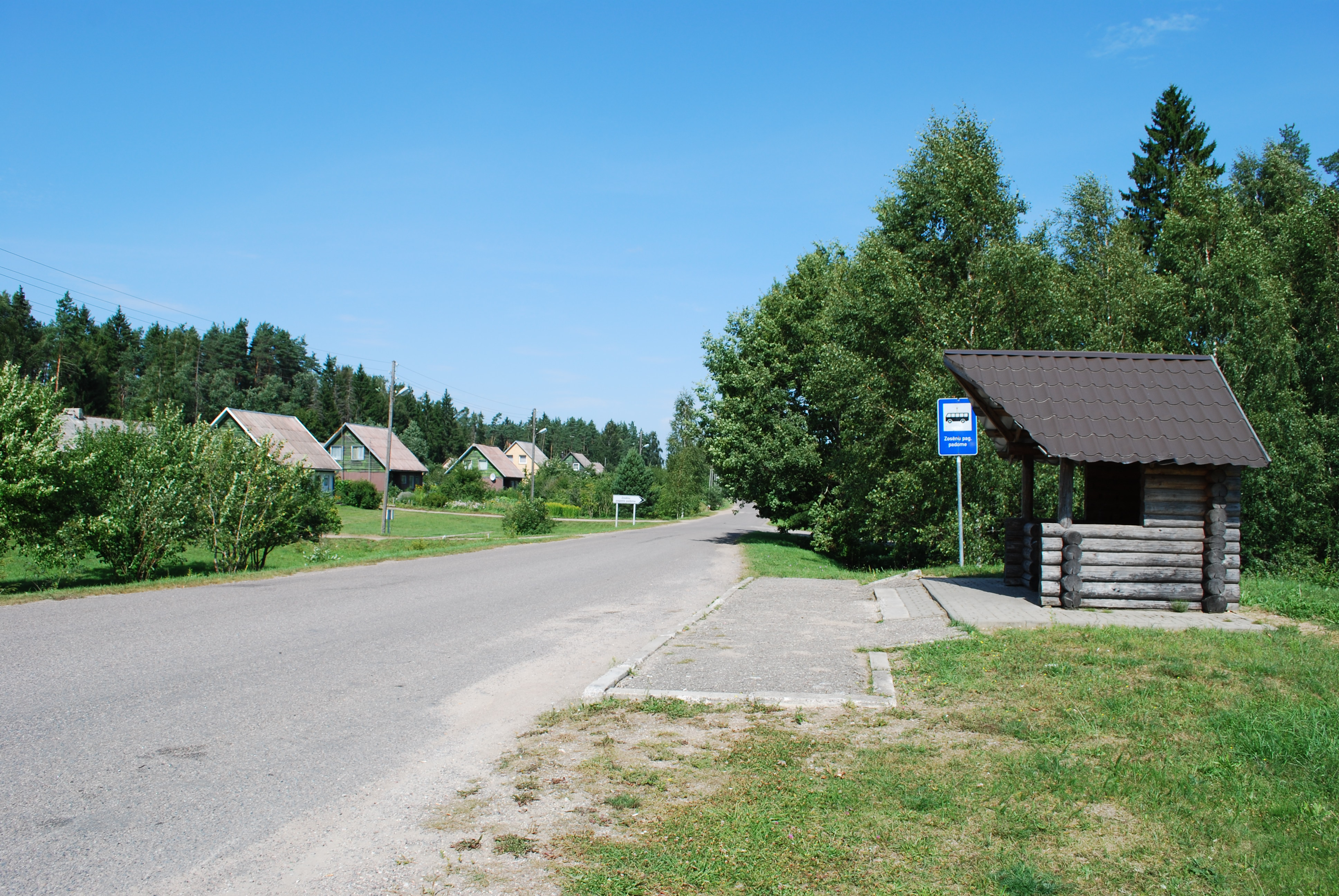 Melnbārži